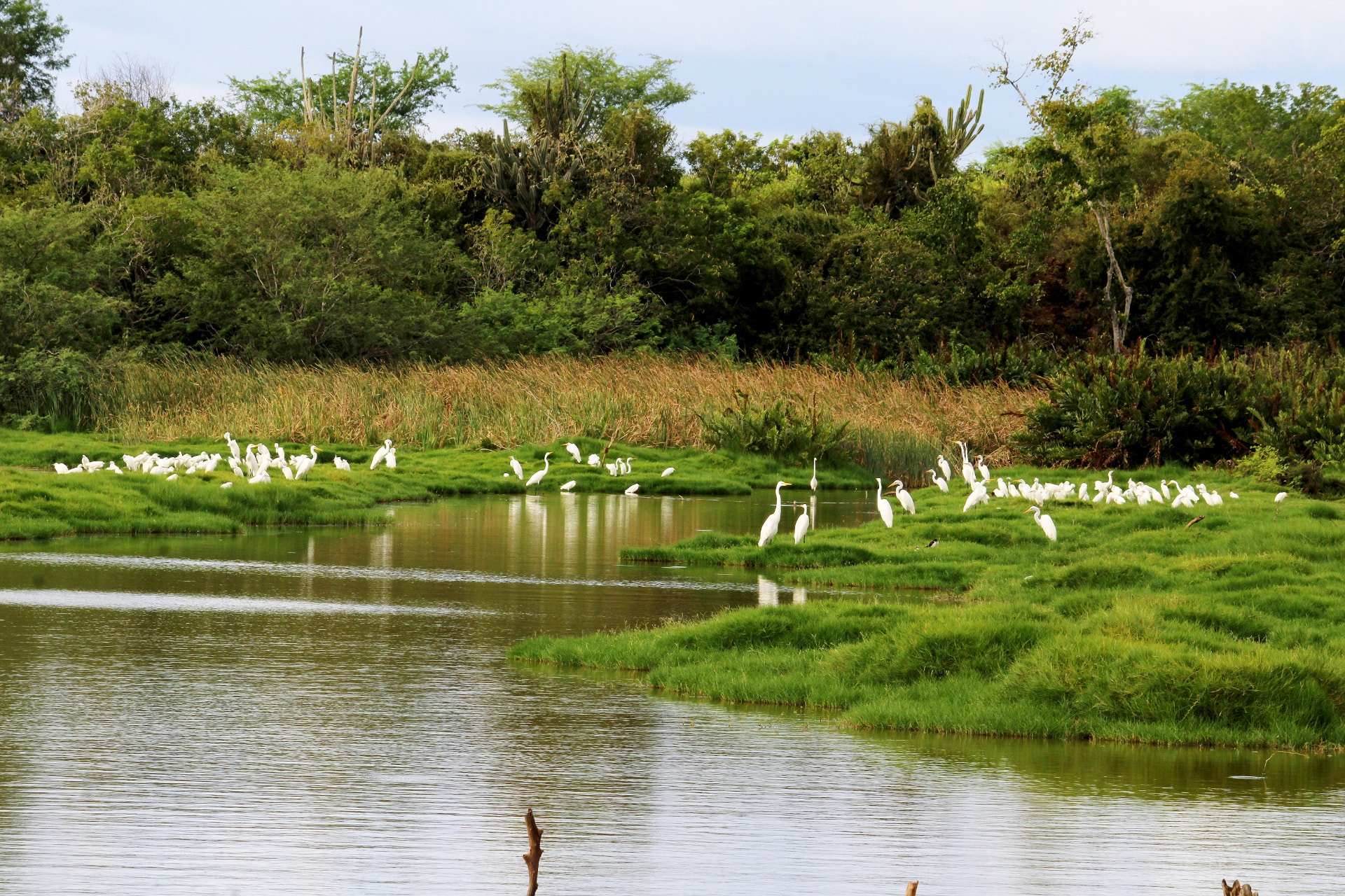 Pântano ao lado da Barragem do Poço Grande - Araci - Bahia. Foto mostra a exuberância na natureza na região da Barragem.